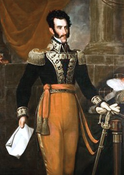 Reproducción en tres cuartos del Retrato del general Antonio Gutiérrez de la Fuente (1796-1878)